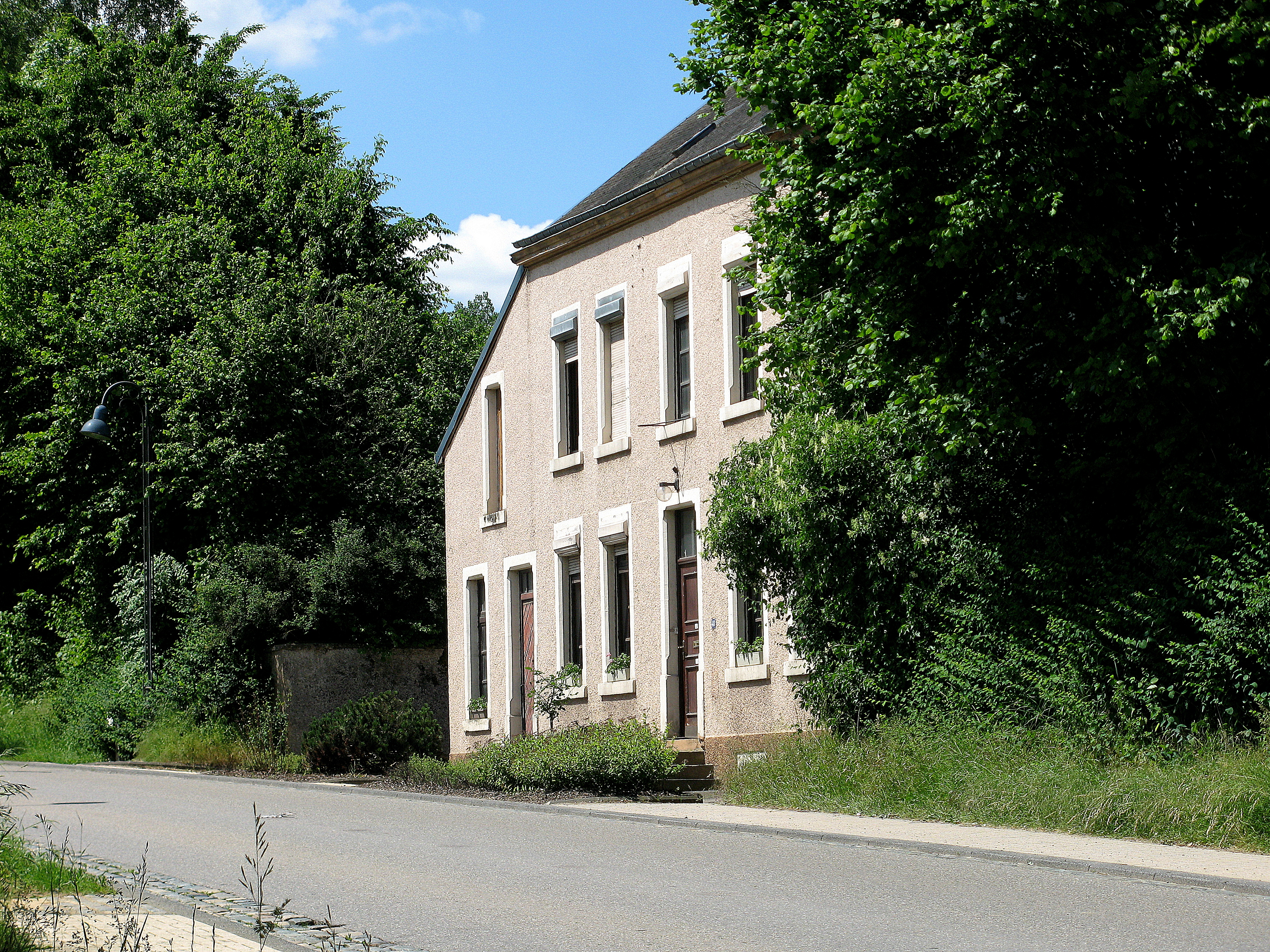 Déi fréier Gendarmerie zu Uewerpallen